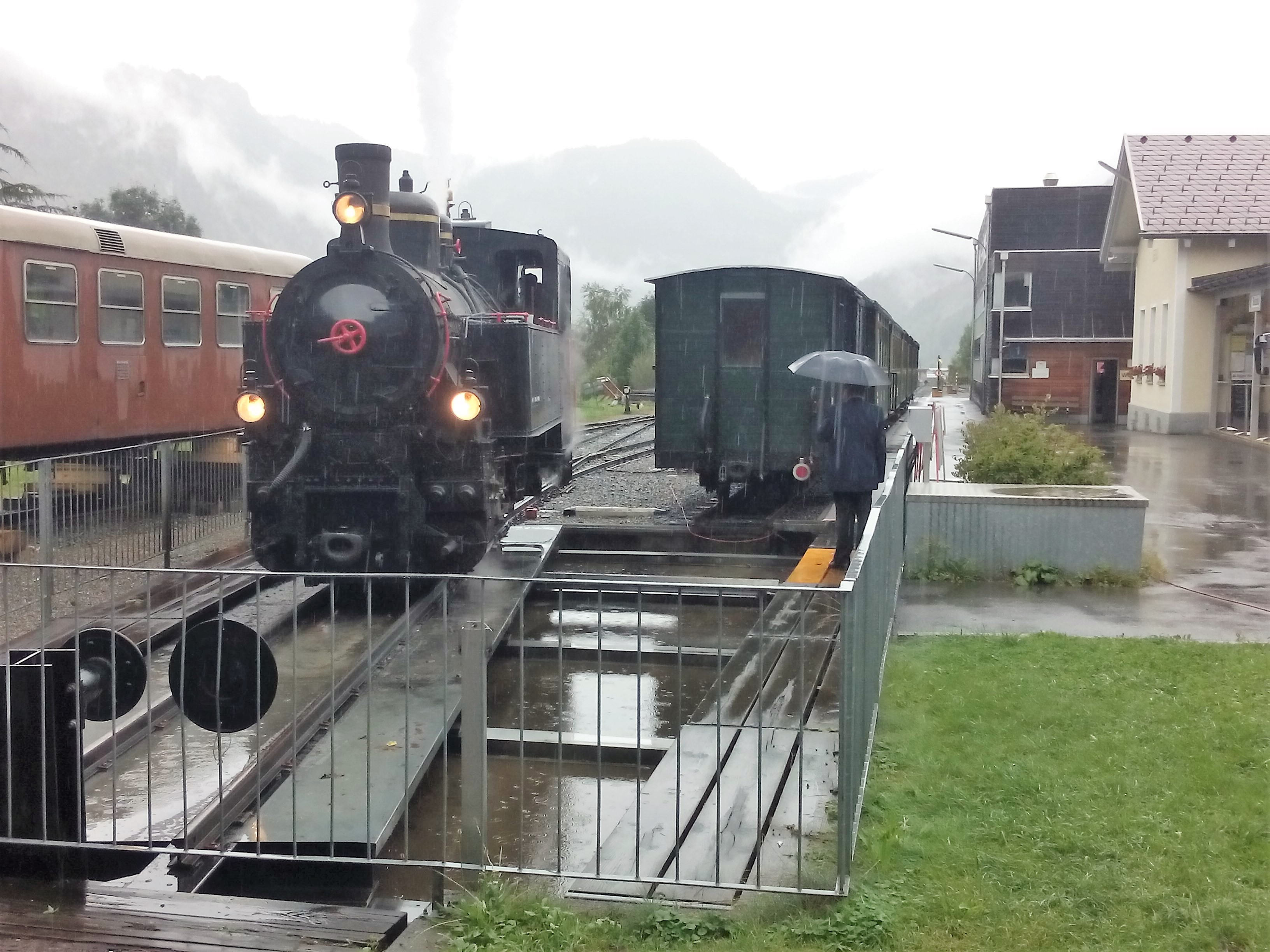 Segmentdrehscheibe setzt am Bahnhof Bezau die Dampflok um